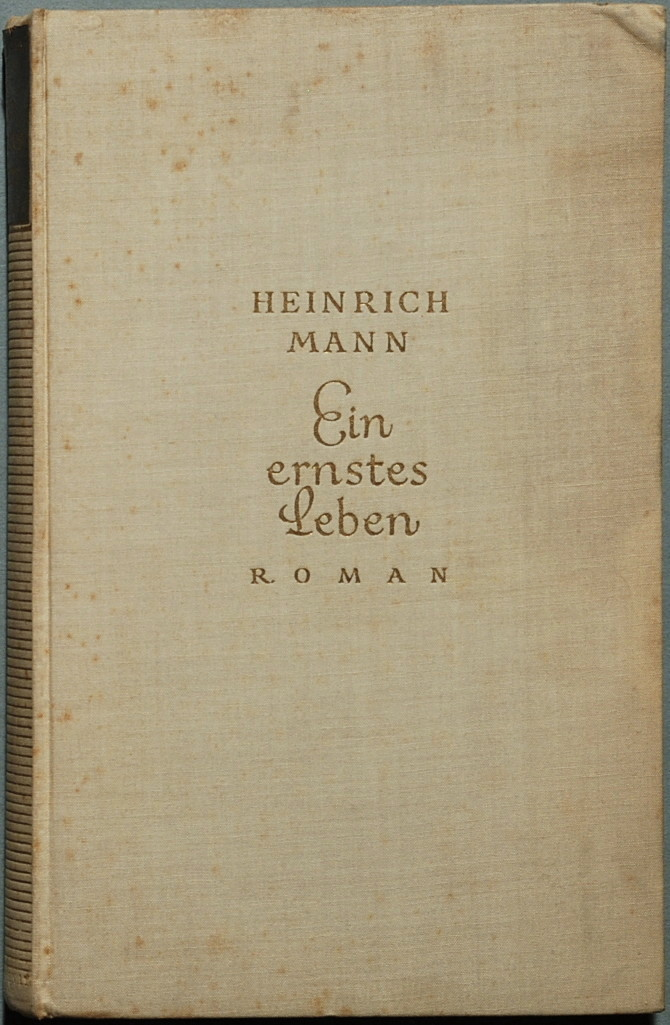 Mann, Heinrich: Ein ernstes Leben. Roman. Berlin Wien Leipzig: Zsolnay 1932, 333 Seiten. Erstdruck (Wilpert/Gühring² 63)